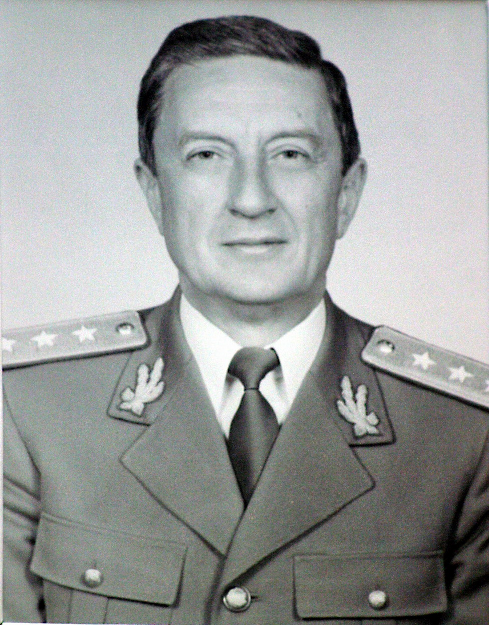 Generalul Victor Atanasie Stănculescu.